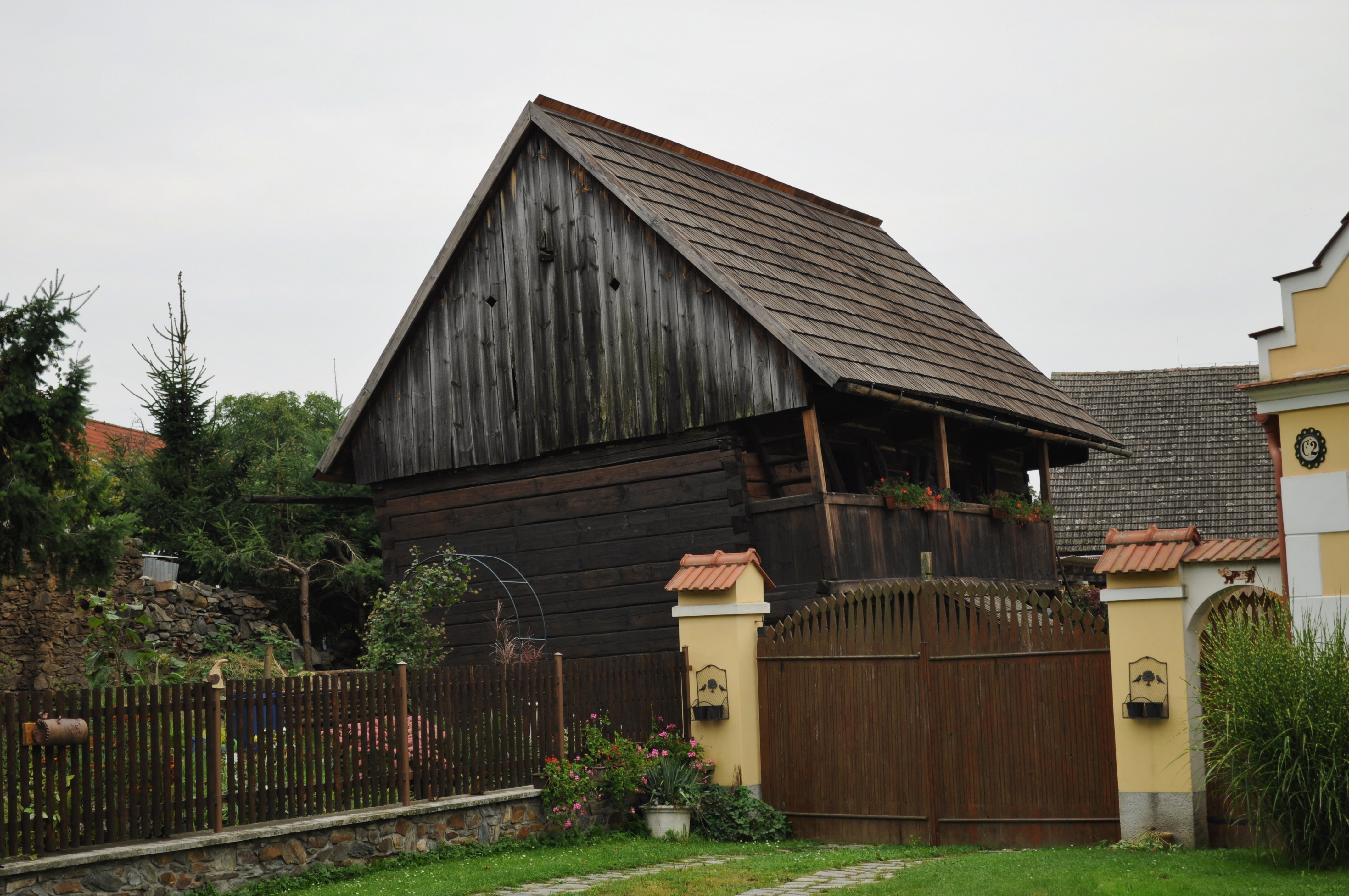 Severní část sroubku usedlosti čp. 2, Jarov 2, Jarov (okres Plzeň-sever).